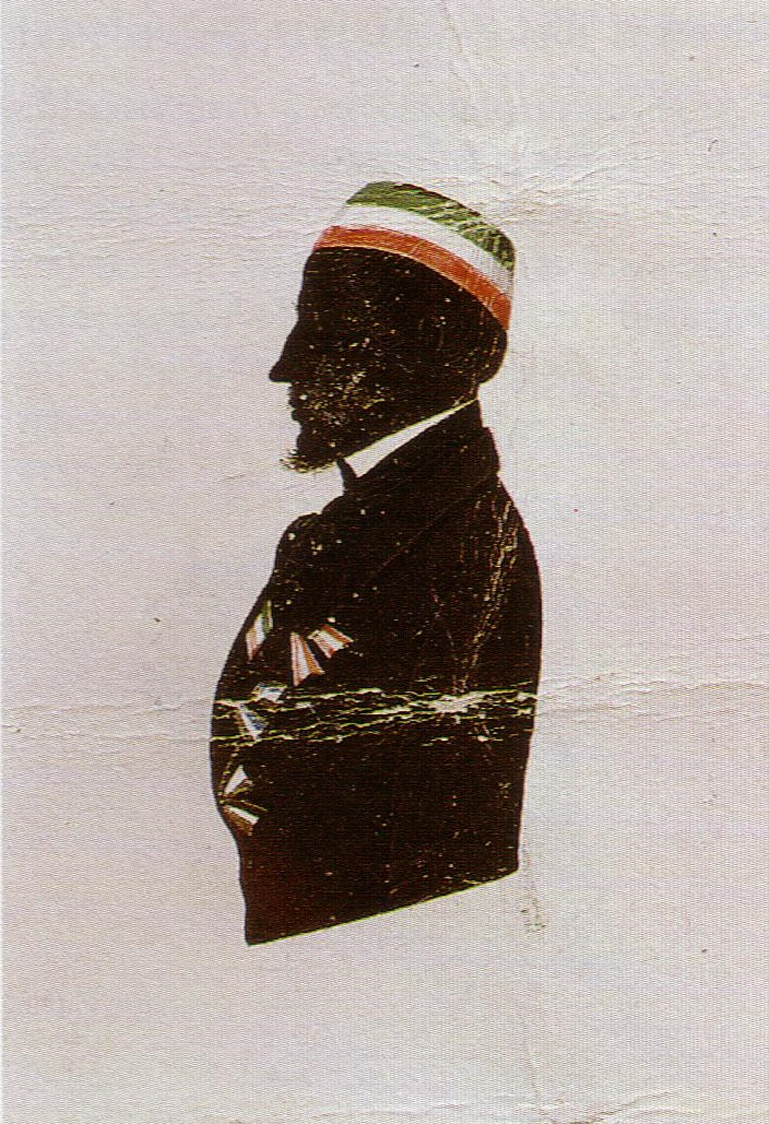 Silhouette des Marburger Corpsstudenten Emmerich Berner. Sie ist insofern einmalig, als Berner die Farben von vier Marburger Corps trägt: Hassia, Teutonia, Marcomannia und Alemannia